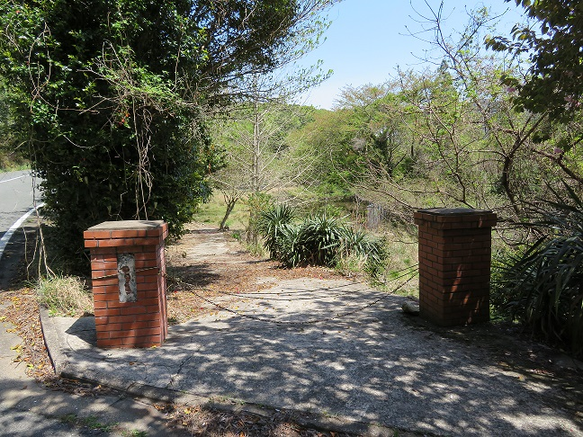 美津島町立今里小学校吹崎分校跡